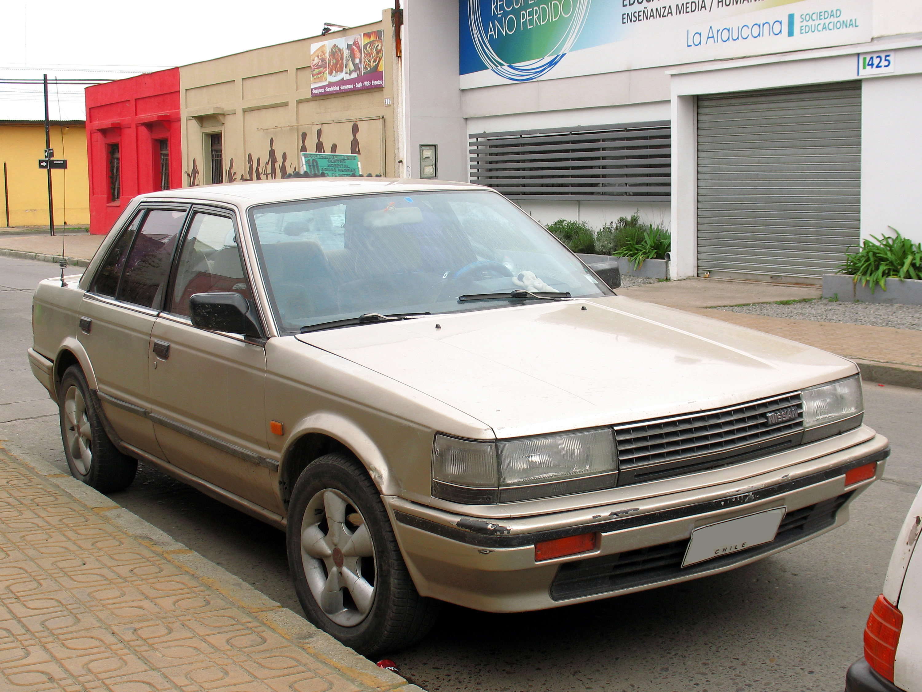 Nissan Bluebird 1.8 GL 1988